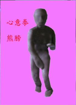 心意拳熊膀